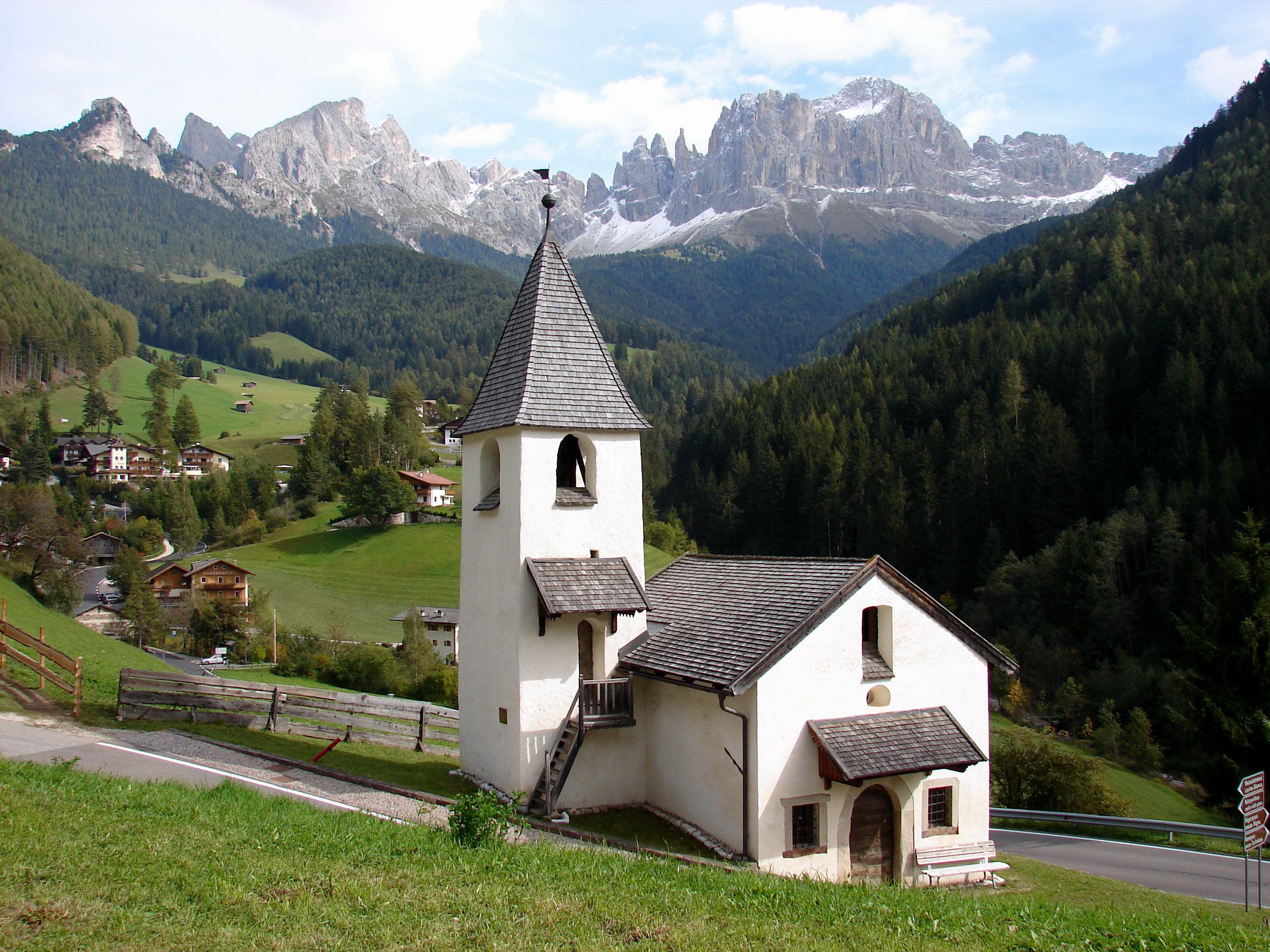 Die Zypriankirche ist, wie die Tierser Pfarrkirche St. Georg, im 13. Jahrhundert entstanden und den Heiligen Cyprian und Justina von Antiochia geweiht. Sie wurde um 1583 umgestaltet. Das Fresko an der Außenseite stammt aus dem 17. Jahrhundert.